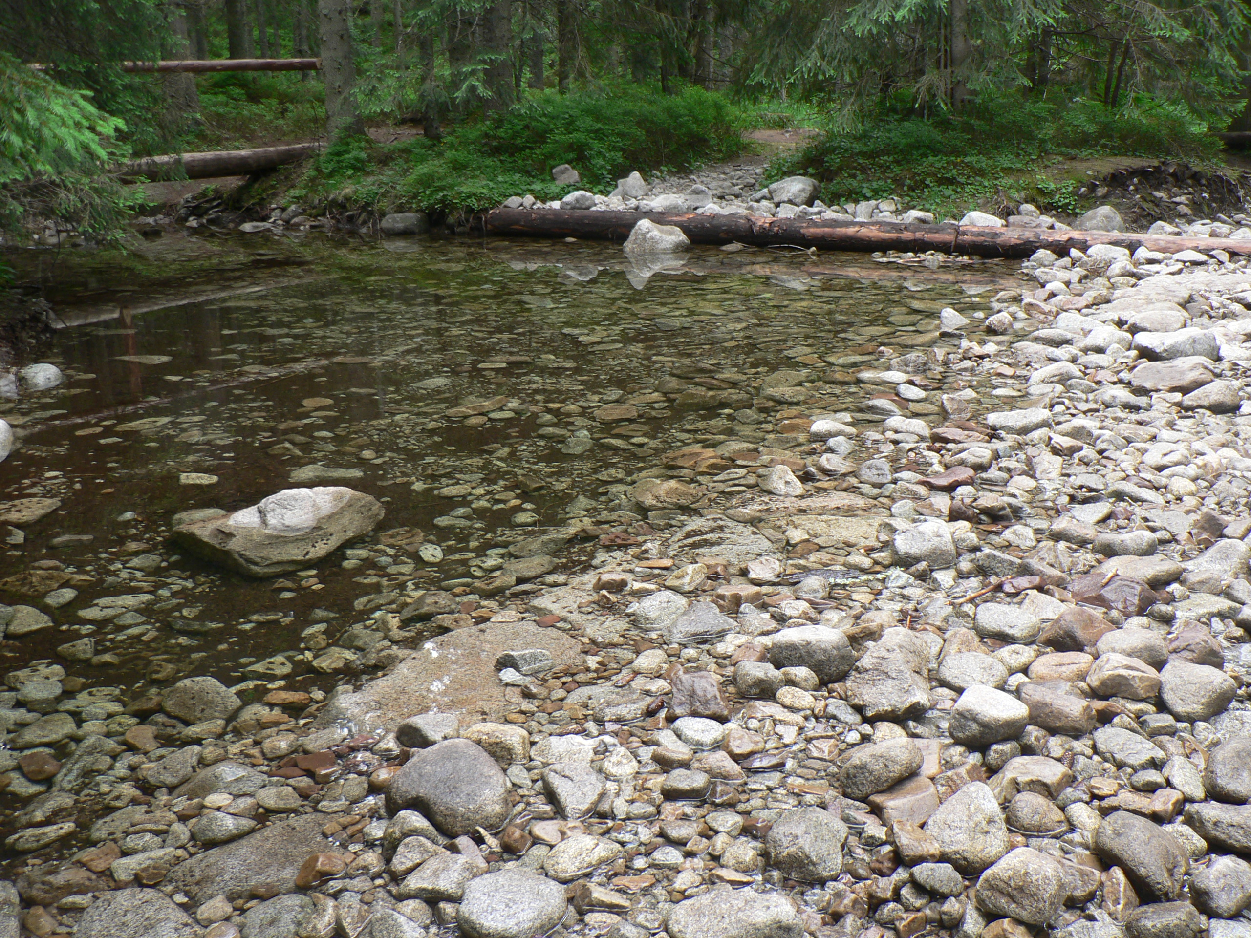 Pańszczycki Potok przy szlaku z Psiej Trawki na Rówień Waksmundzką